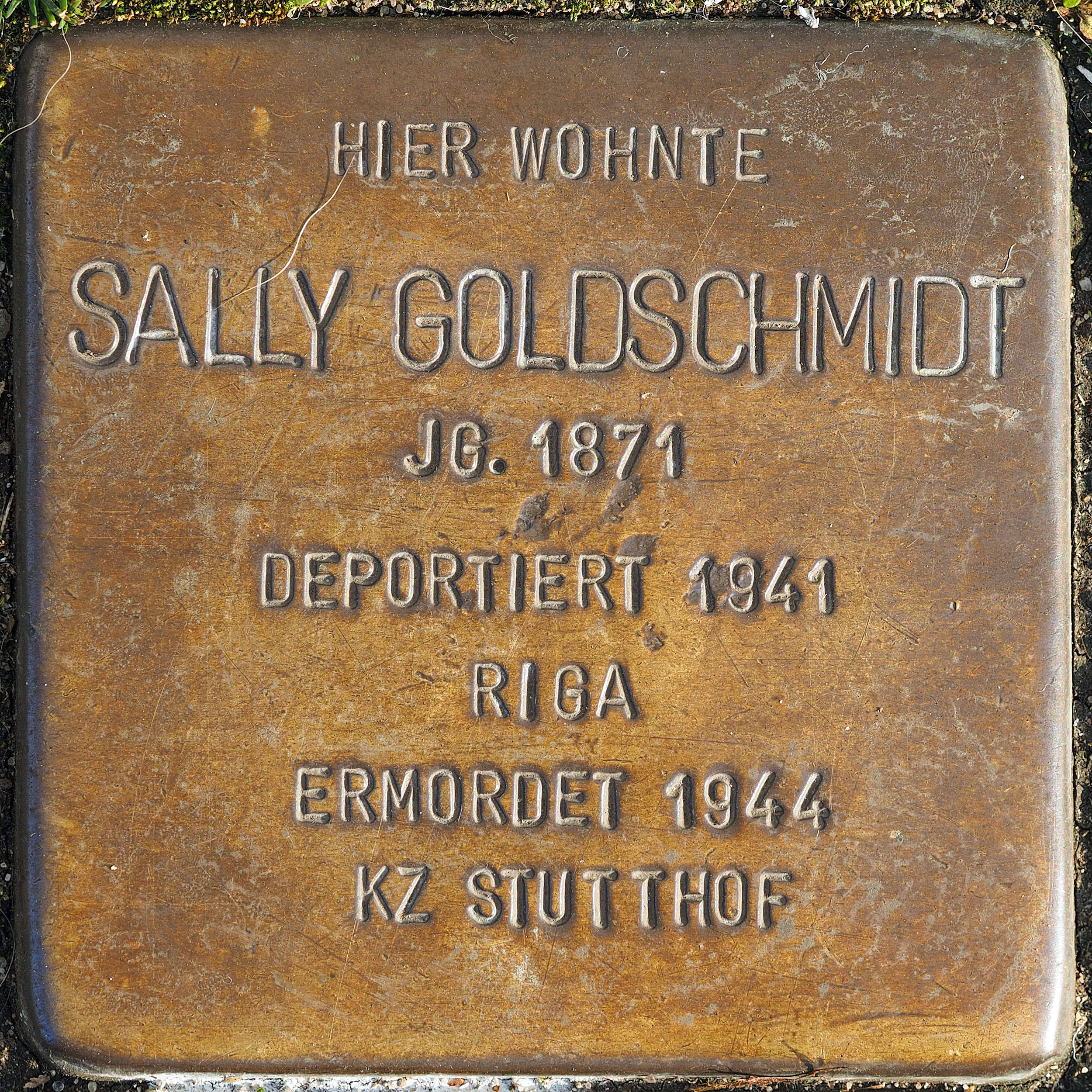 Stolperstein DU 288: Goldschmidt, Sally